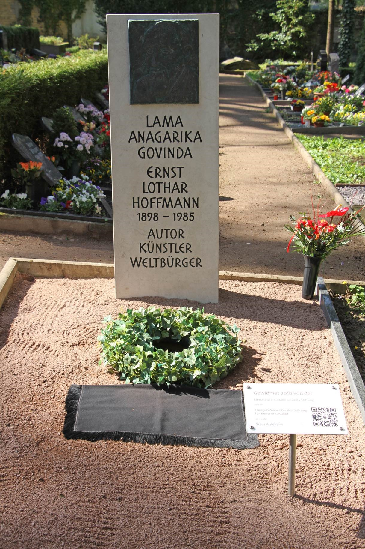 Deitsch: Grabstein Lama Anagarika Govinda in Waldheim (Sachsen)